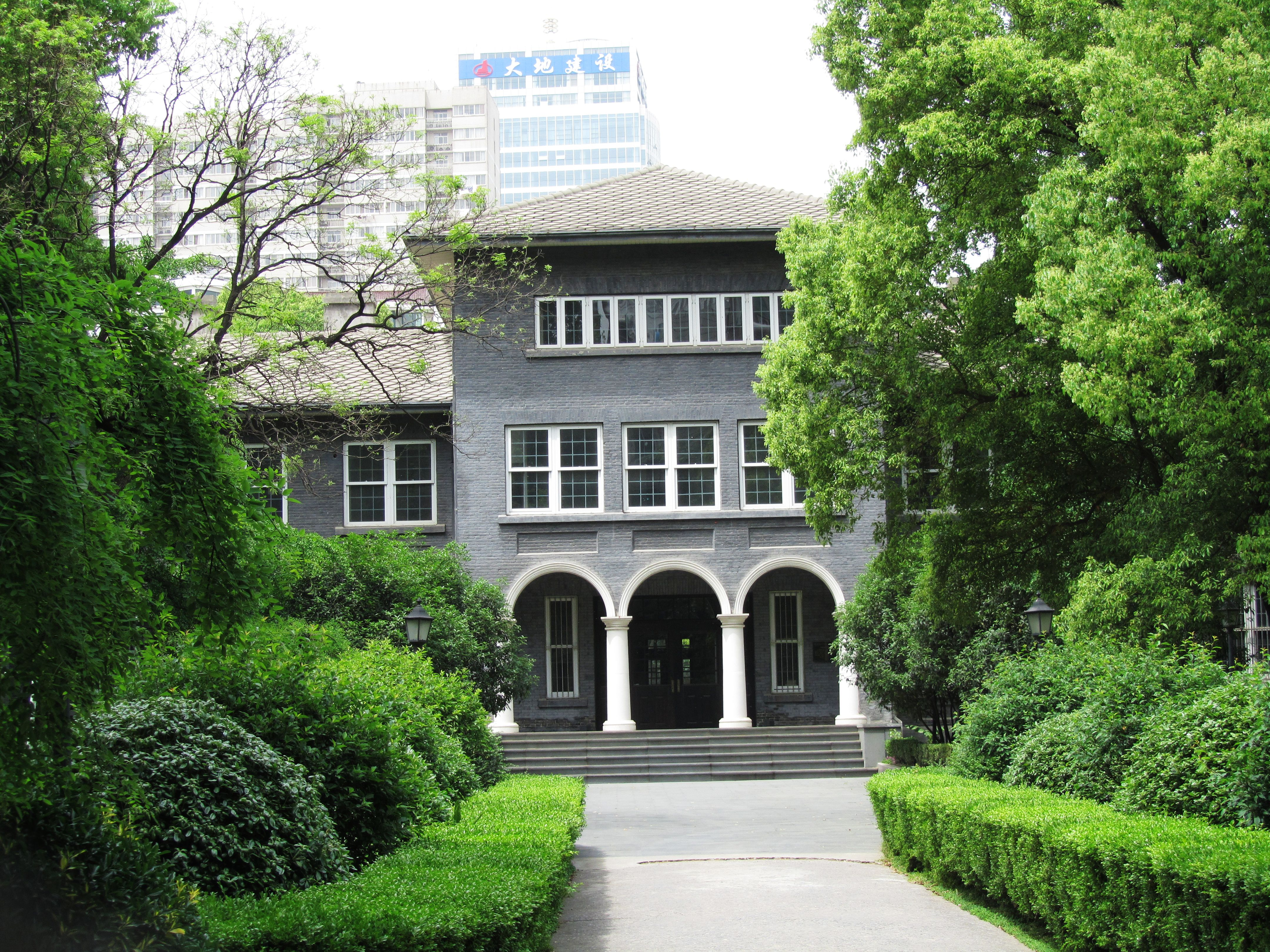 金陵协和神学院旧址，位于大锏银巷17号。